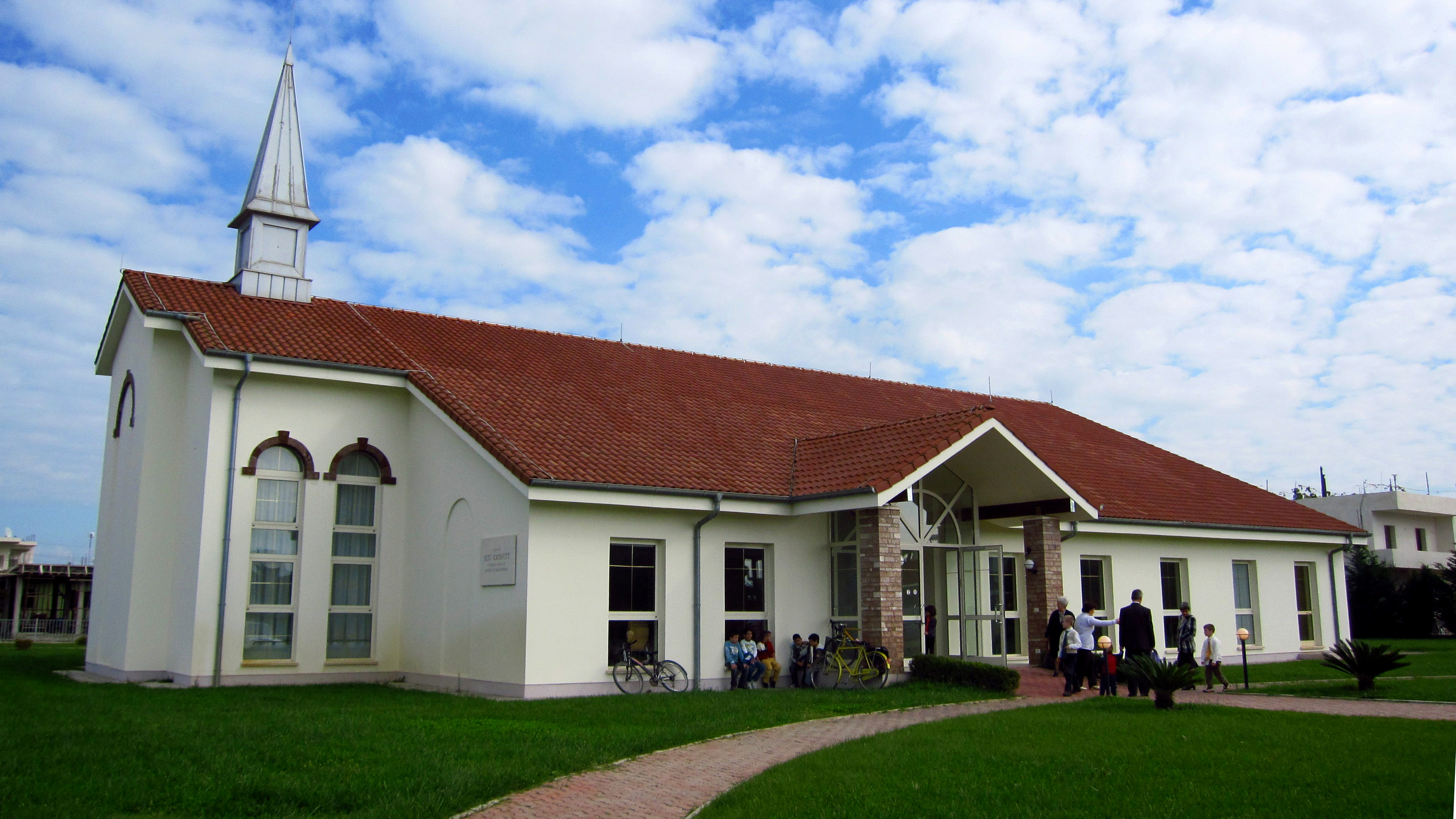 Ndërtesa e Kishës së Durrësit është ndërtuar në vitin 2006